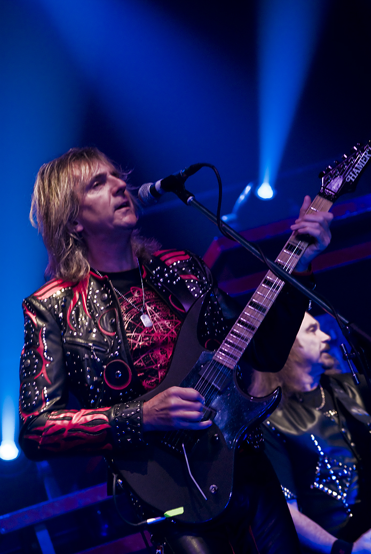 Glenn Tipton, guitarrista de Judas Priest.